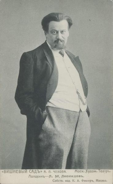 Актер Леонид Леонидов в роли Лопахина в спектакле «Вишневый сад» по пьесе Антона Чехова